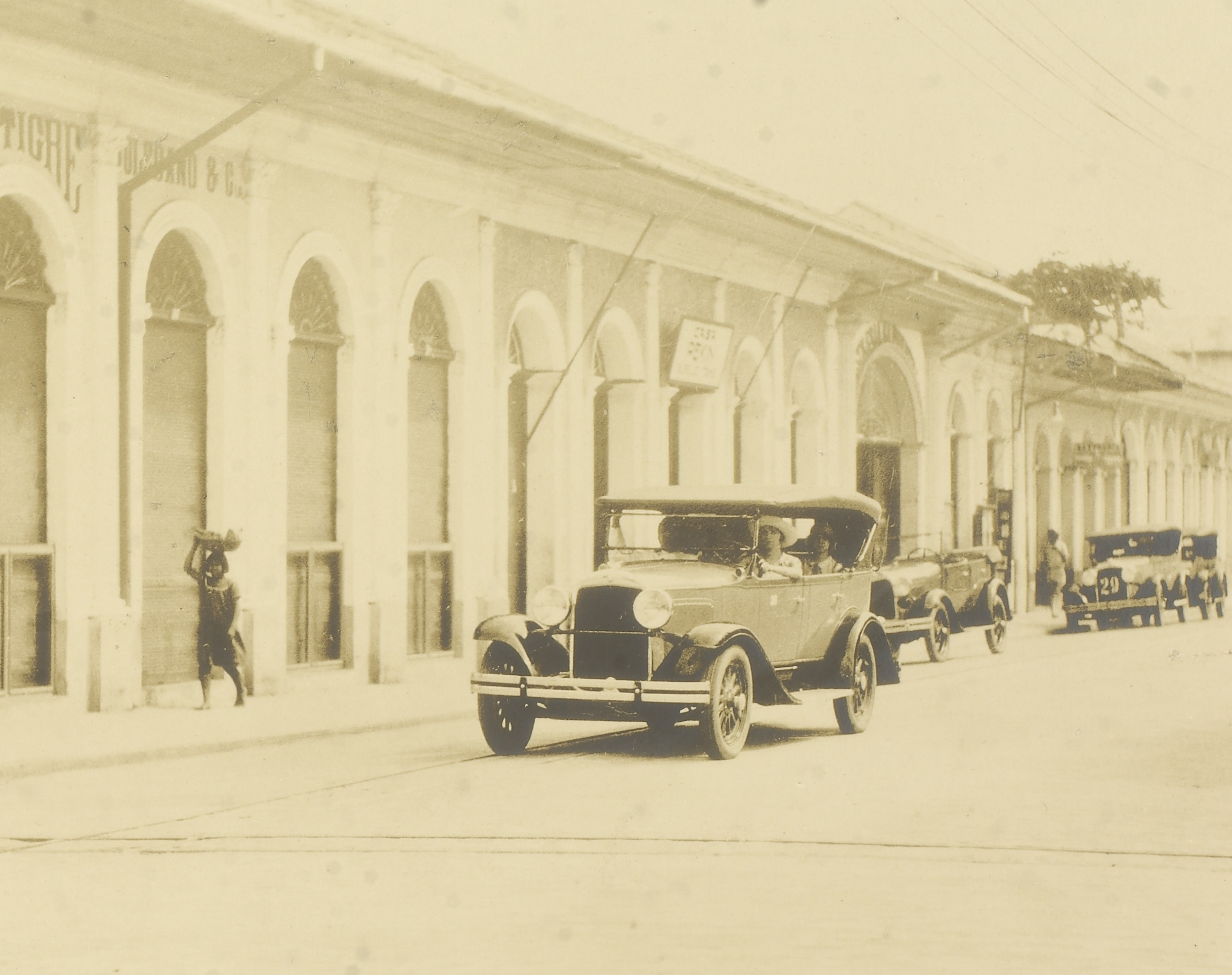 Imagem do Fundo Ministério da Guerra, do Arquivo Nacional